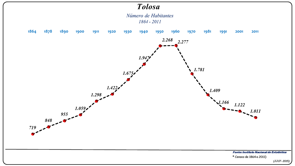 Evolução da População